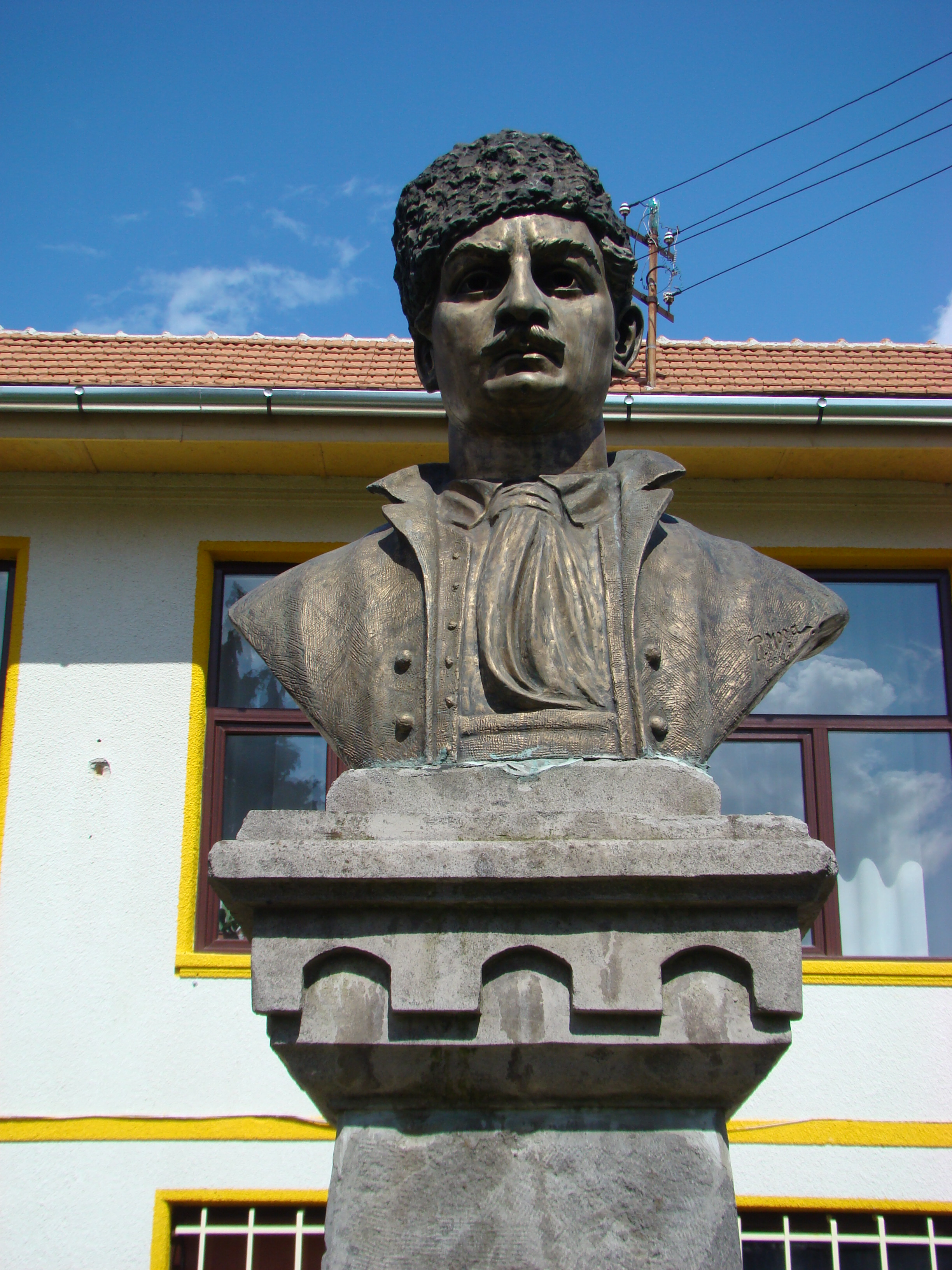 Bustul lui Avram Iancu, sat BAIA DE CRIŞ; comuna BAIA DE CRIŞ